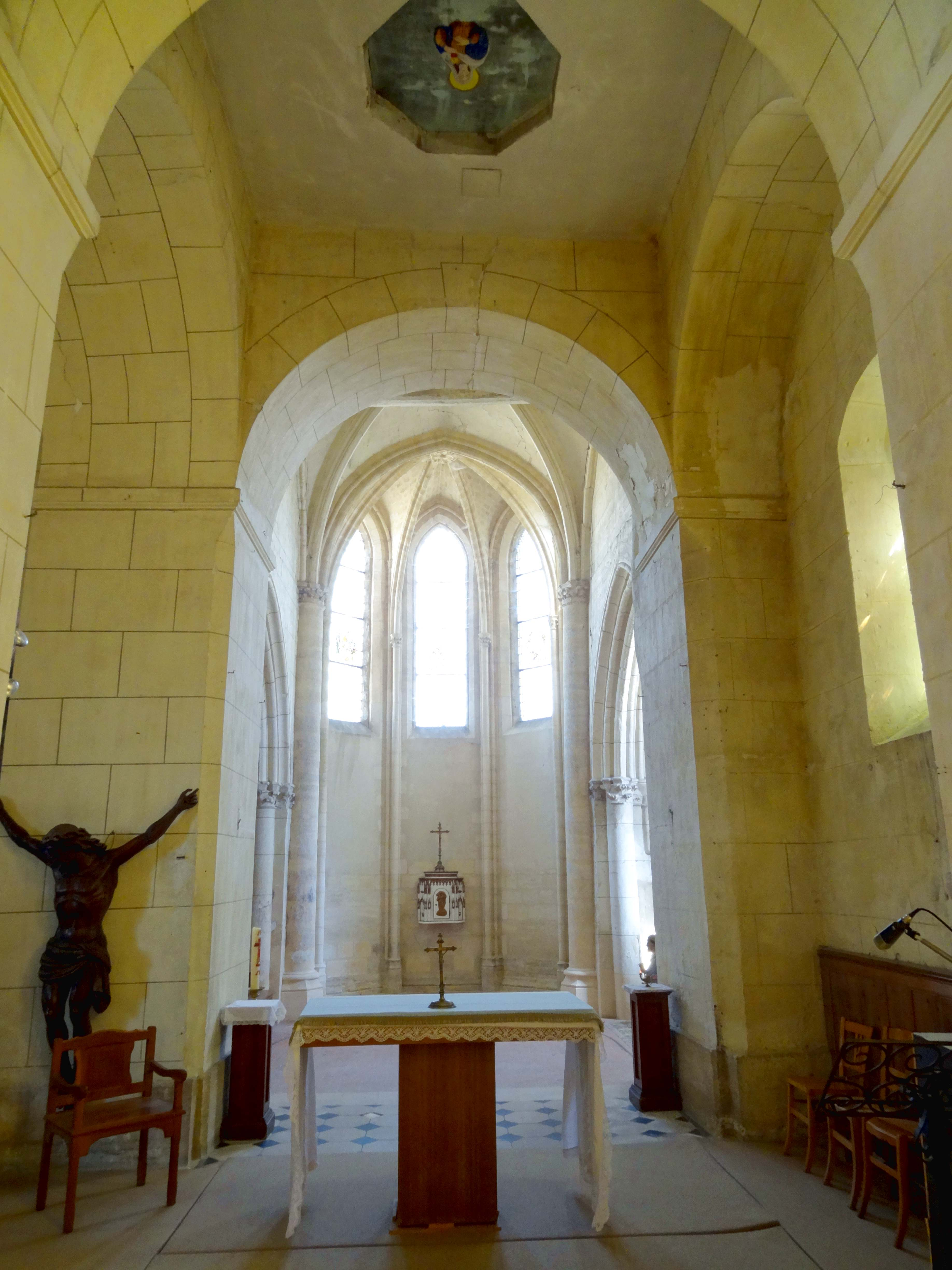 Intérieur de l'église - voir titre.